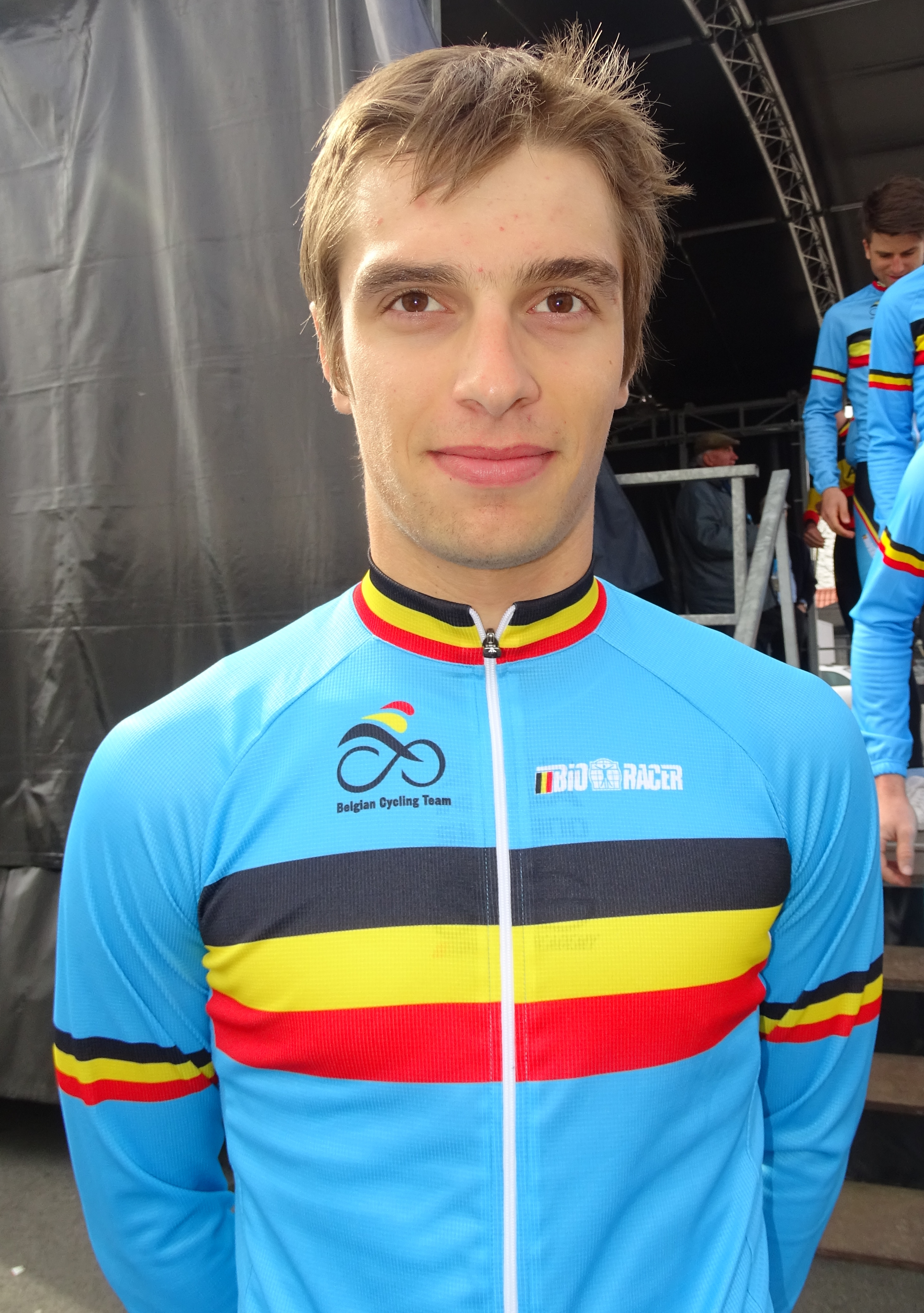 Reportage réalisé le samedi 9 avril à l'occasion du départ et de l'arrivée du Tour des Flandres espoirs 2016 à Audenarde, Belgique.